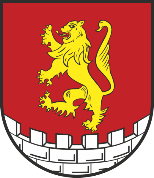 Wappen der ehemaligen Samtgemeinde Stadtoldendorf, in Rechtsnachfolge fortgeführt von der Samtgemeinde Eschershausen-Stadtoldendorf, Landkreis Holzminden, Niedersachsen „Das Wappen zeigt auf rotem Grund und silberner Stadtmauer mit 6 Zinnen einen nach heraldisch rechts schreitenden goldenen Löwen, goldbewehrt und goldbezungt.“[1] Die Samtgemeinde Eschershausen-Stadtoldendorf hat bei Ihrer Gründung am 1. Januar 2011 das frühere Wappen der ehemaligen Samtgemeinde Stadtoldendorf als neues Hoheitszeichen übernommen.